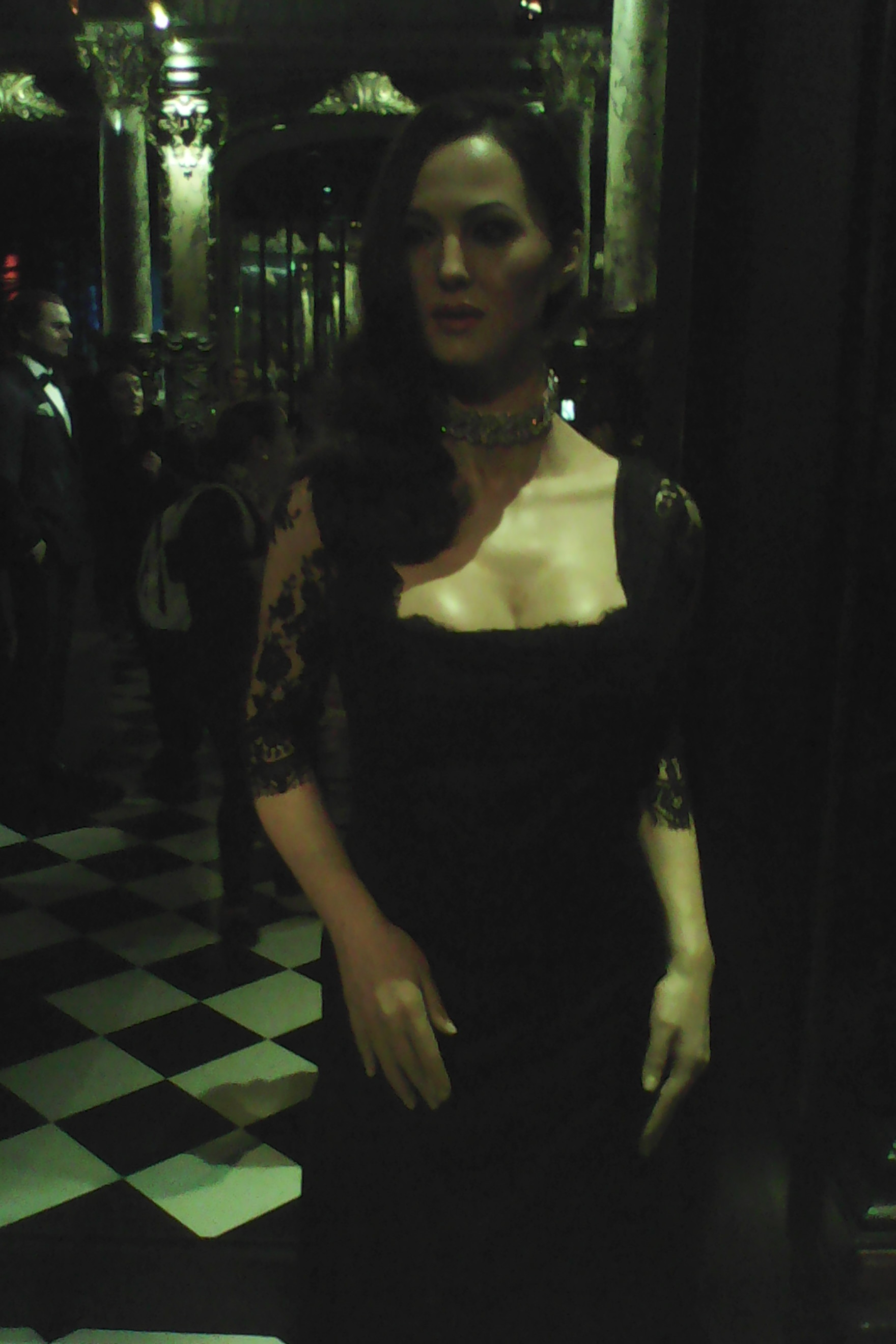 Statue de Monica Bellucci